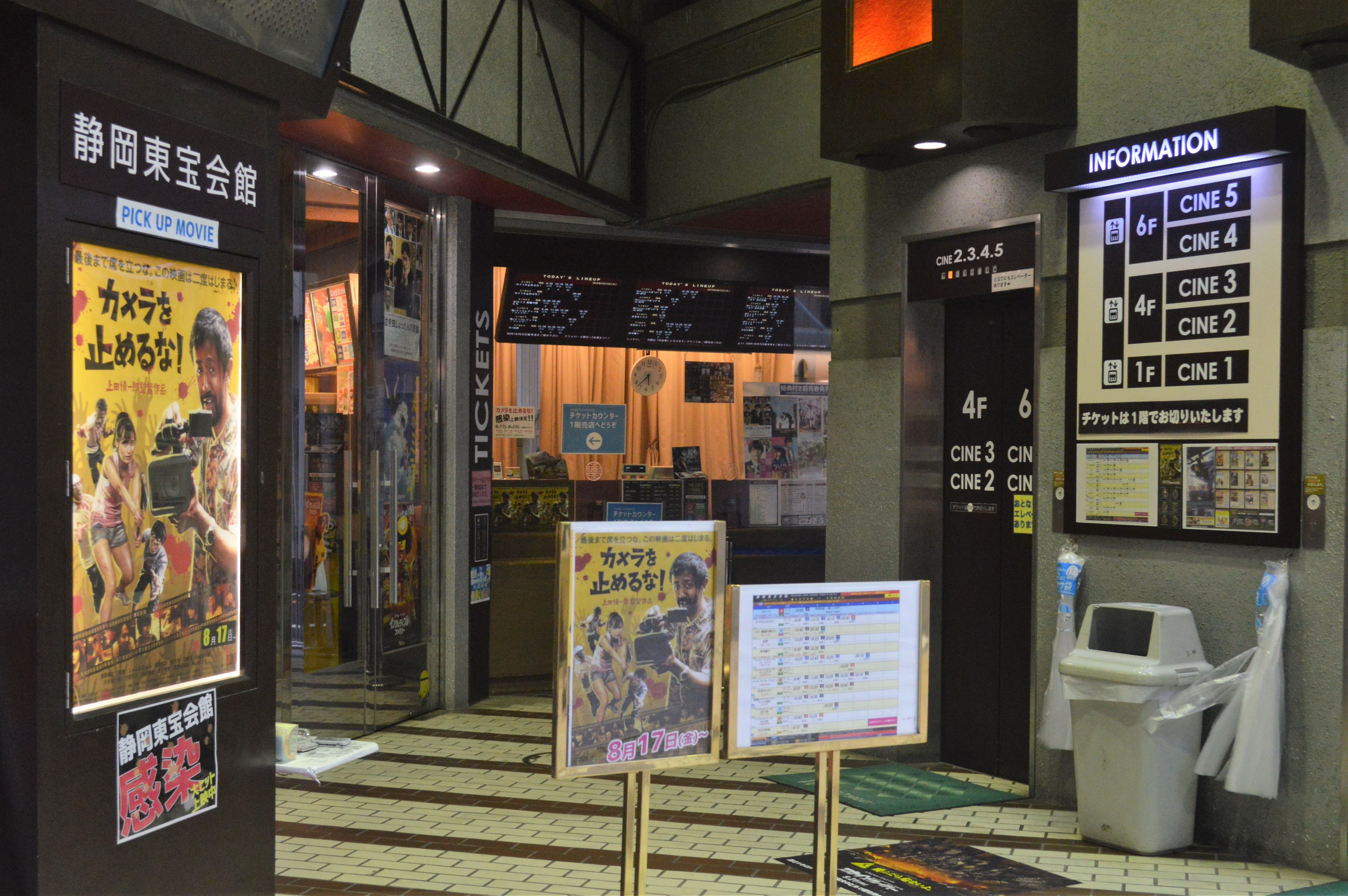 静岡市葵区七間町にある静岡東宝会館。